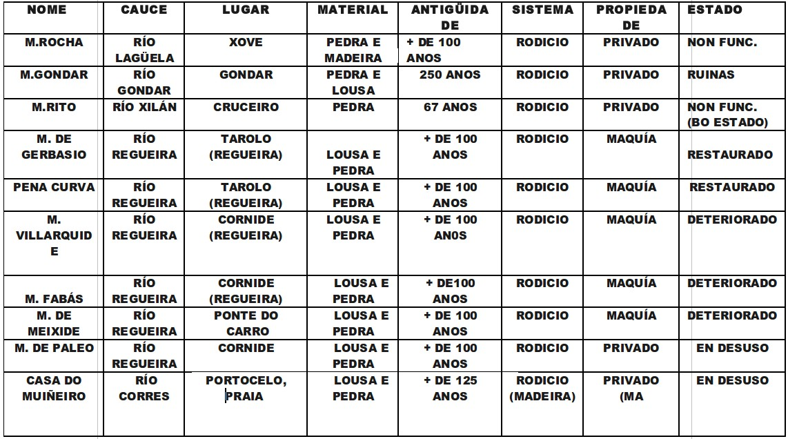 Cadro dos muiños de xove